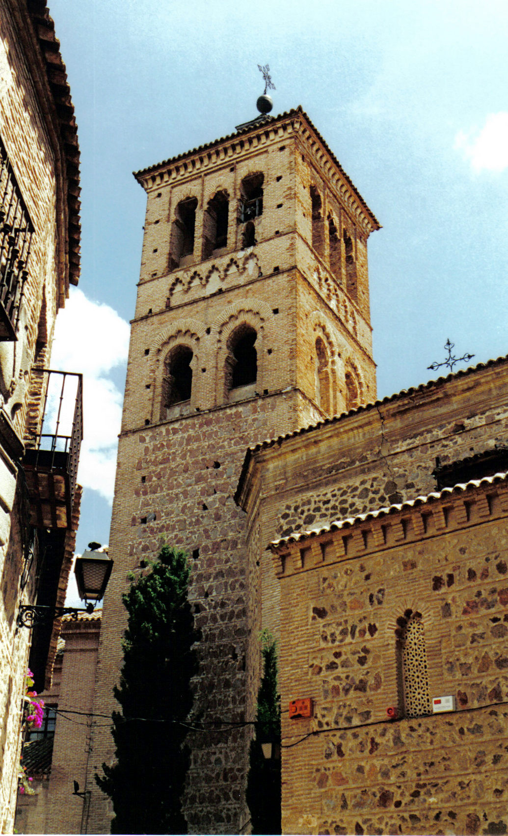 Clocher mudéjar de San Roman à Tolède